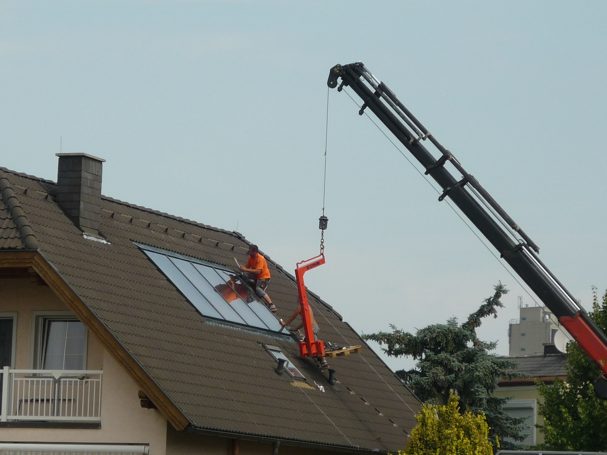 Ein Sonnenkollektor, montiert in Schwechat, Österreich.